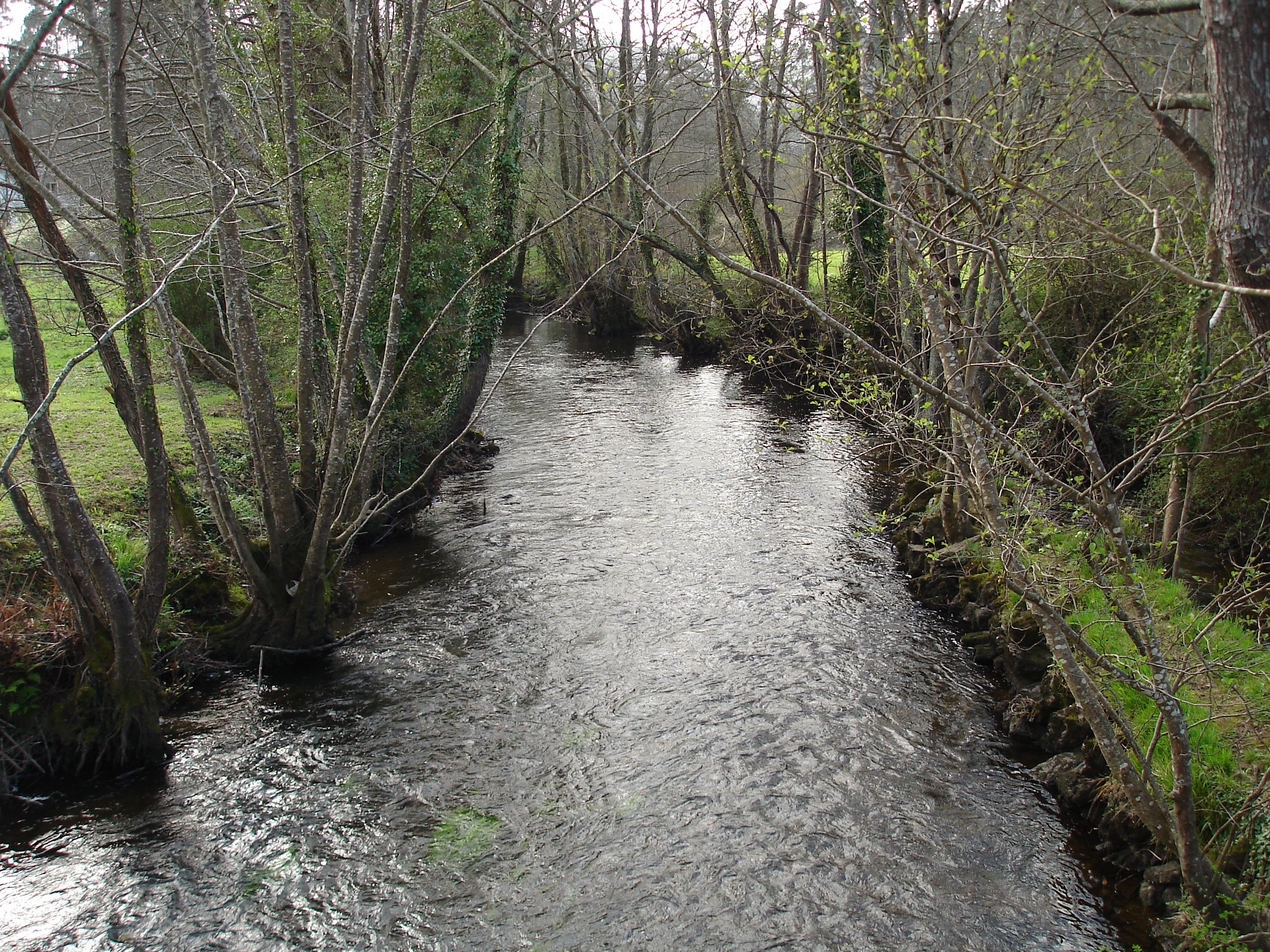 O río Xuvia ó seu paso pola parroquia de Pedroso en Narón